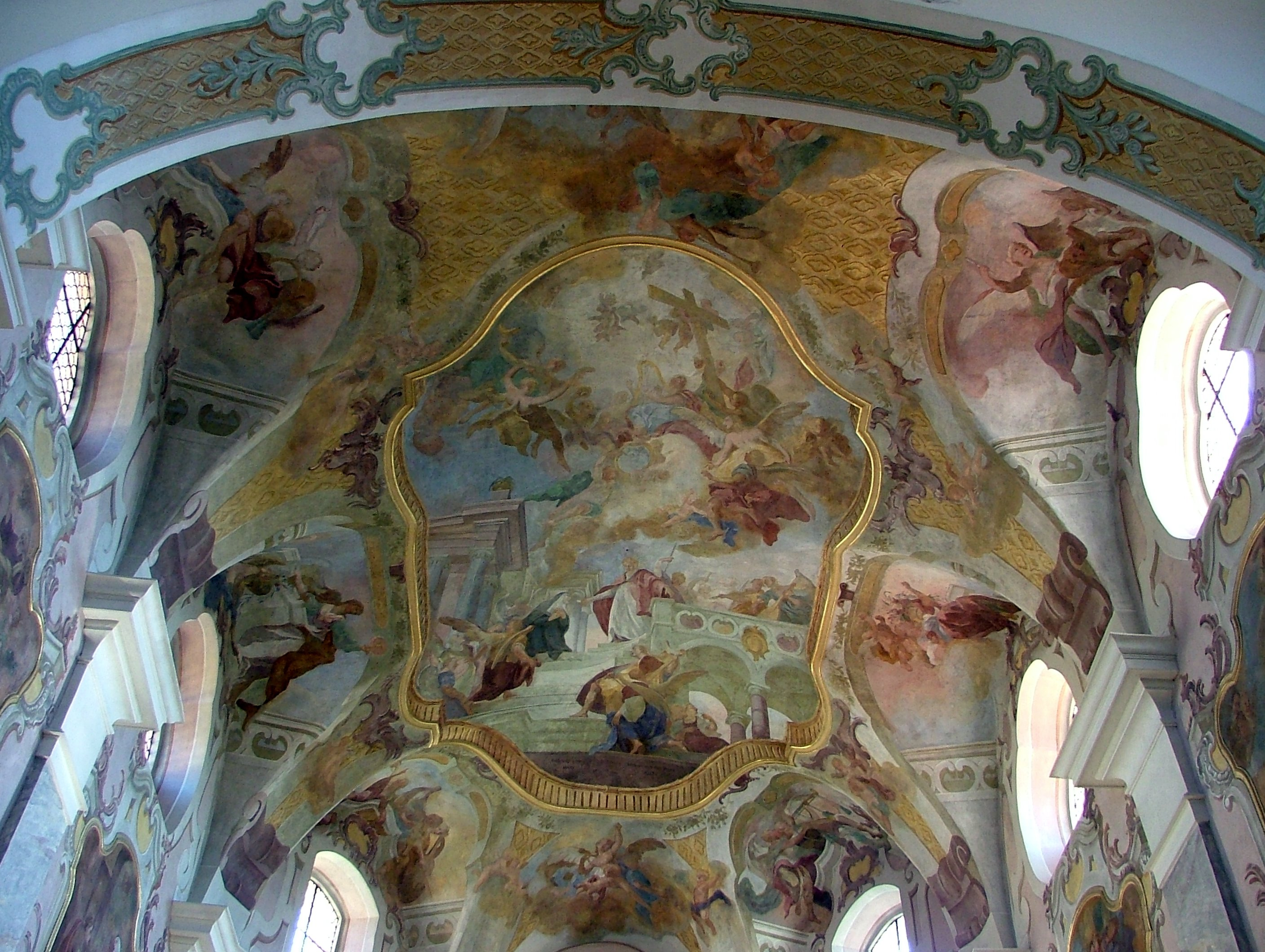 Kloster- und Pfarrkirche St. Peter und Paul (Reute), Deckenfresko im Chor